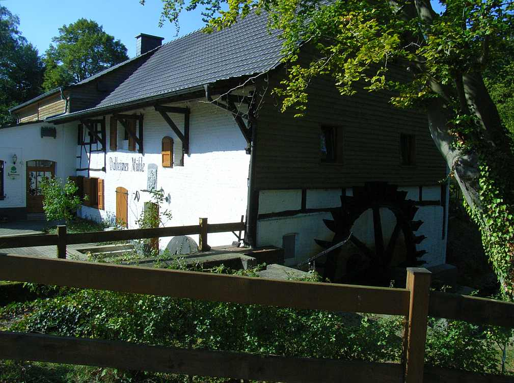 Dalheimer Mühle, Wegberg, NRW